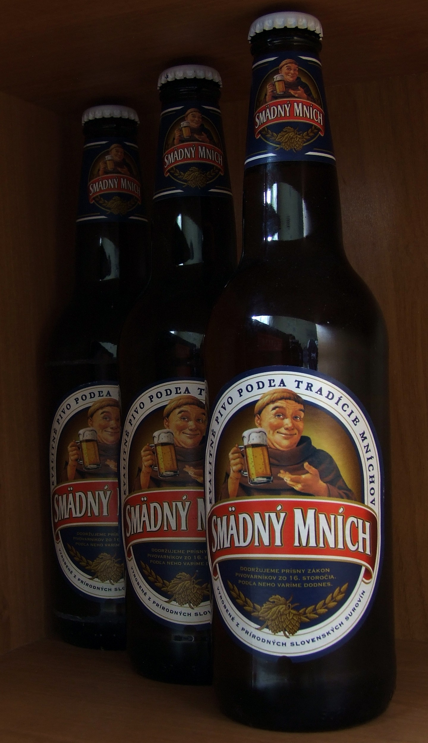 Licensing: This image or multimedia was created by Bartosz Senderek. The image or audio is licensed under CC-BY license. Attribution to me is required. Licencja: Ten obrazek lub plik multimedialny został stworzony przez Barotsza Senderka. Został on udostępniony na licencji CC-BY. Informacja o moim autorstwie jest wymagana. "I want to use the image/multimedia. How can I do that?" You can use this image/multimedia freely for any purpose, including commercial use, provided that you license it under the above license. My suggestion is to use text shown below: If you use the image I would appreciate it if you would let me know on my talk page, but this is not required as long as you follow the above license. "Chcę użyć tego pliku. Jak mogę to zrobić?" Możesz używać tej grafiki/multimediów darmowo w każdym celu, włączając użycie komercyjne, udostępniając go dalej na powyższej licencji. Jeśli zdecydujesz się na publikację zdjęcia mojego autorstwa obowiązkowo podpisz go w sposób podany w sekcji "Licensing text". Jeżeli użyłeś mojego pliku możesz powiadomić mnie o tym na mojej stronie dyskusji, lecz nie jest to wymagane, dopóki trzymasz się powyższej licencji.